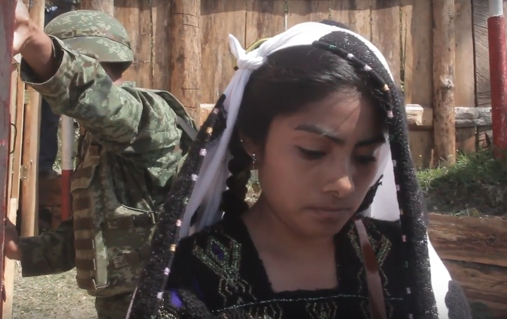 Ación de las mujeres de la Organización Sociedad Civil Las Abejas de Acteal, ante el campamento militar en la comunidad de Majomut, Chenalho, Chiapas. En el marco del Día Internacional de la Mujer. 08 de marzo de 2018.